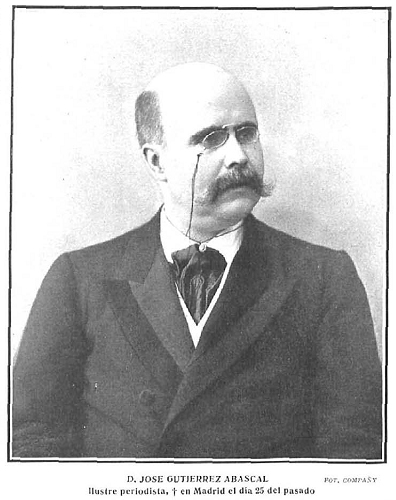 Retrato de José Gutiérrez Abascal, fotografía de Manuel Compañy recogida en la revista española Nuevo Mundo.